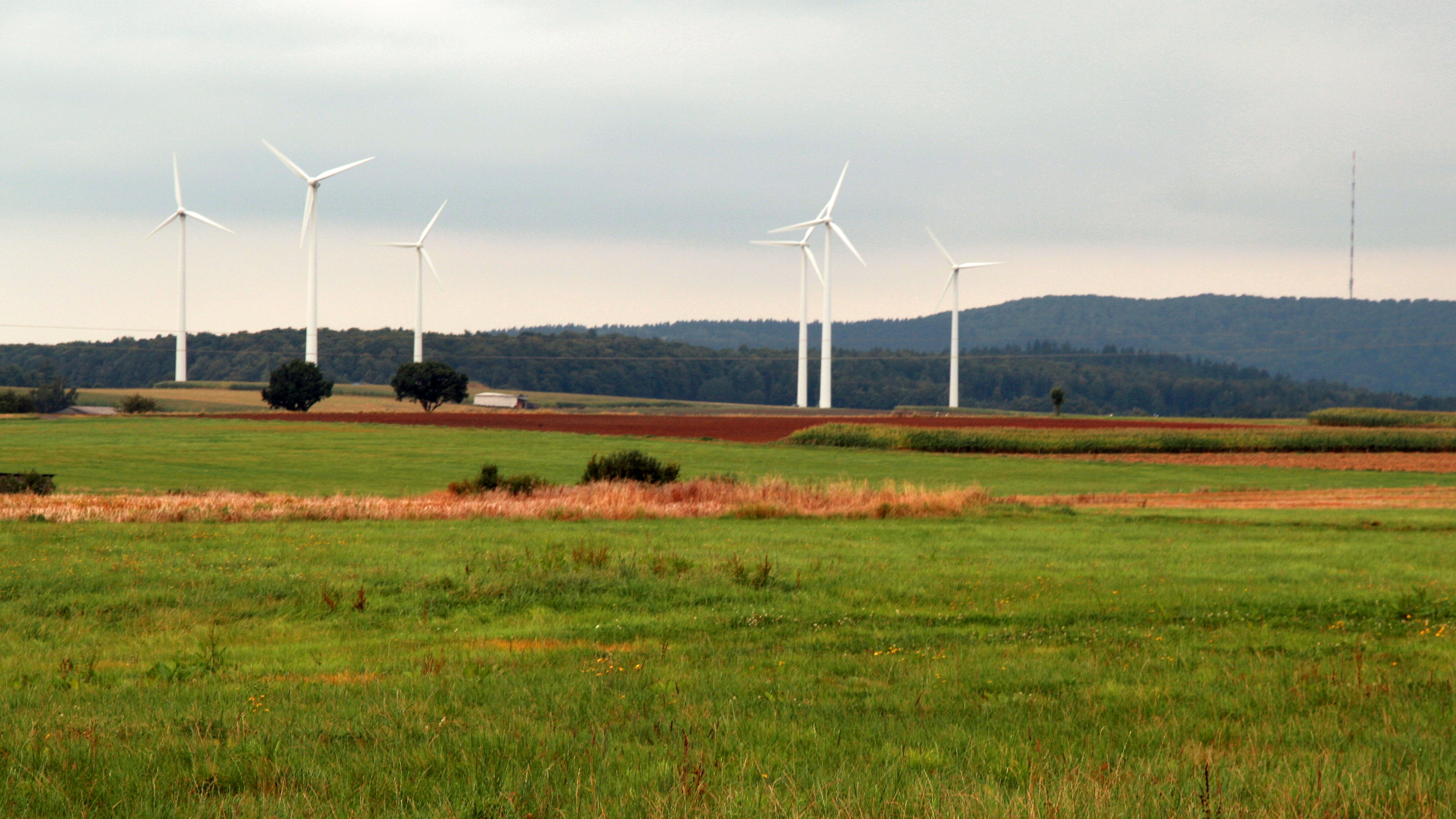 Windpark Lingelbach, Ortsteil von Alsfeld 5 Windkraftanlagen: Hersteller: Pfleiderer, KW pro Anlage: 600, Durchmesser: 50m, Nabenhöhe: 75m, Baujahr: 12/2003 (Quelle